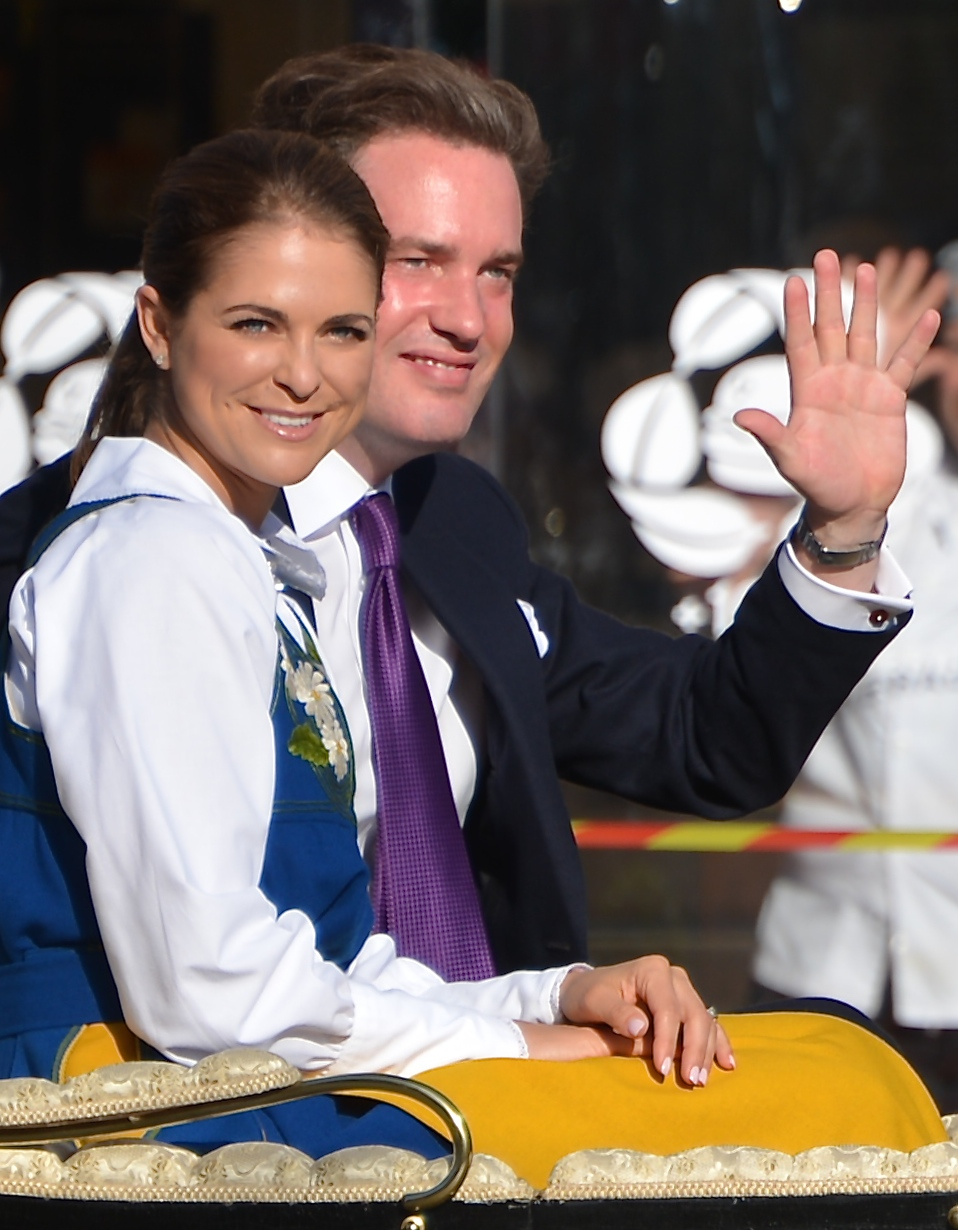 Nationaldagen 2013 i Stockholm.